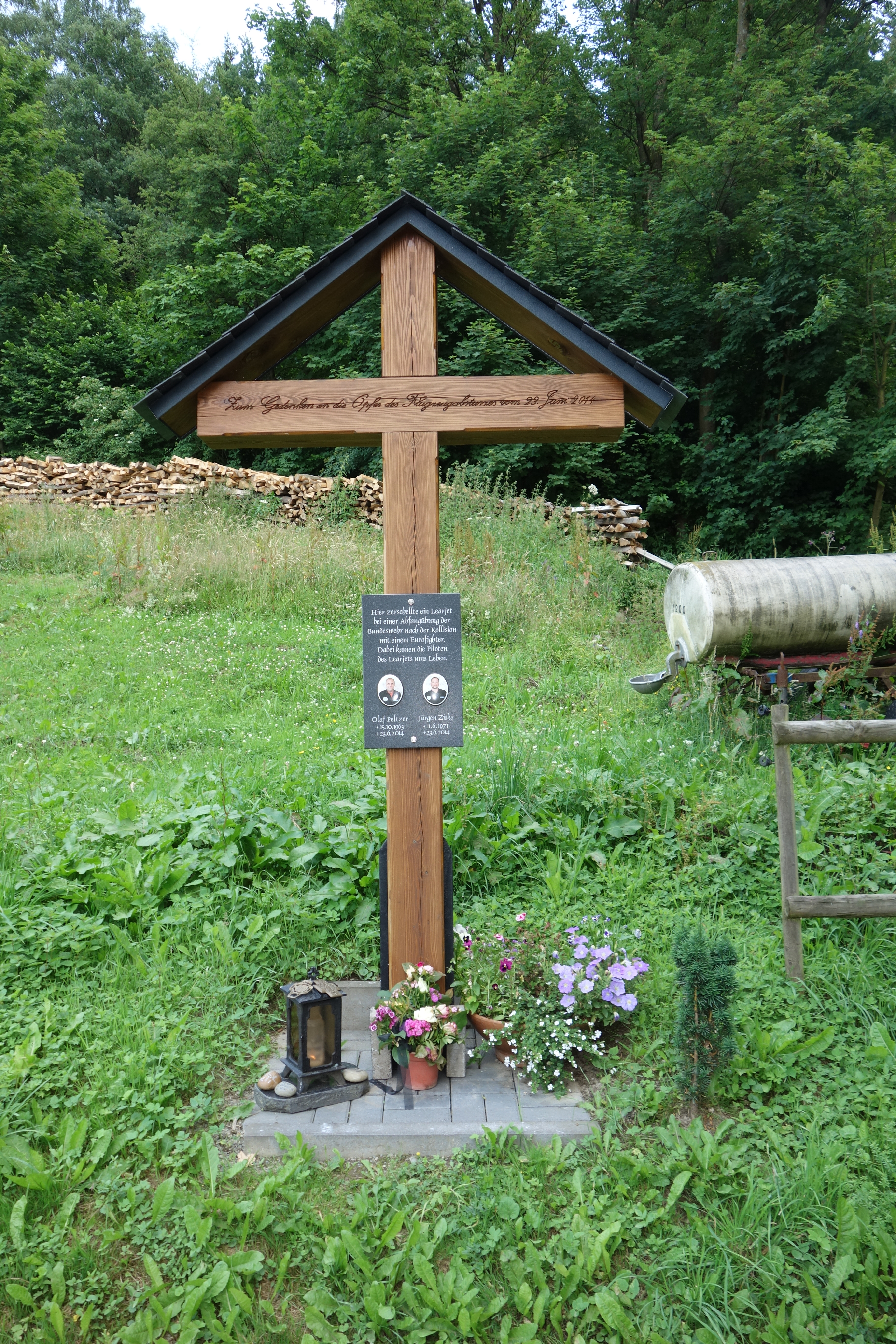 Gedenkreuz für Learjet-Absturz.